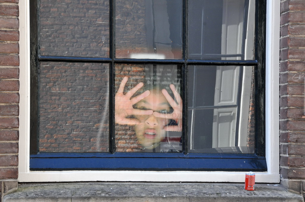 'As you like it (2000)' by Dutch artist Martine Neddam. ‘…De wereld is een theater. En allen, man of vrouw, zijn acteurs – meer niet. Ze komen op, gaan af en spelen vele rollen in hun leven. Zeven bedrijven lang…’ Dit citaat uit ‘As you like it’ van William Shakespeare vormde het uitgangspunt voor het bijzondere kunstwerk dat Martine Neddam maakte voor de (pal naast schouwburg Odeon gelegen) faculteit Drama van ArtEZ (Praubstraat Zwolle). De onthulling van het kunstwerk was de apotheose van de grondige verbouwing van het historische pand dat in 2000 in gebruik werd genomen.